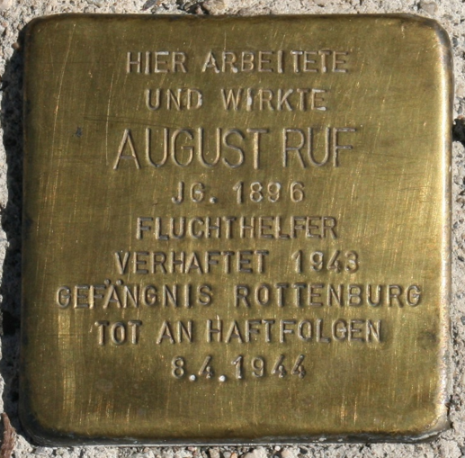 Deutschland (D) - Baden-Württemberg (BW) - Landkreis Konstanz (KN) - Singen (Hohentwiel): Stolperstein 'August RUF'